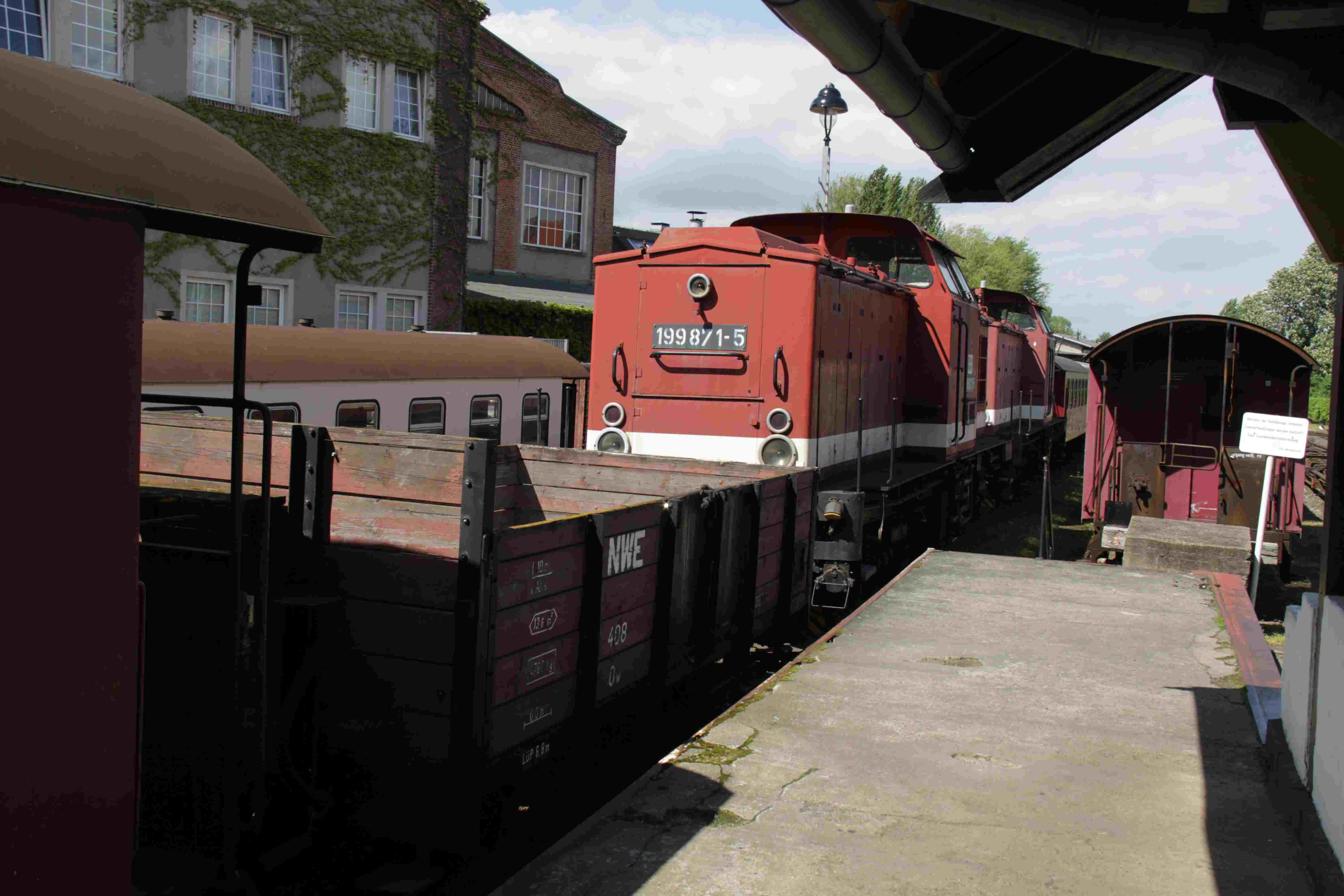 Bw Wernigerode Westerntor 1